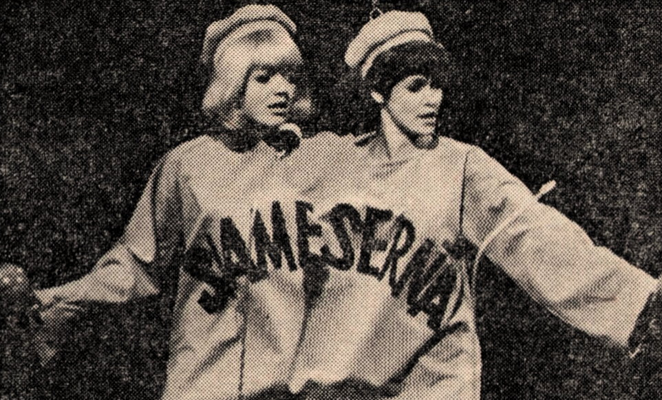 Laila Westersund och Git Kjell, från föreställningen Slaget om Andersson (Bordet runt). (skriven av Hagge Geigert)